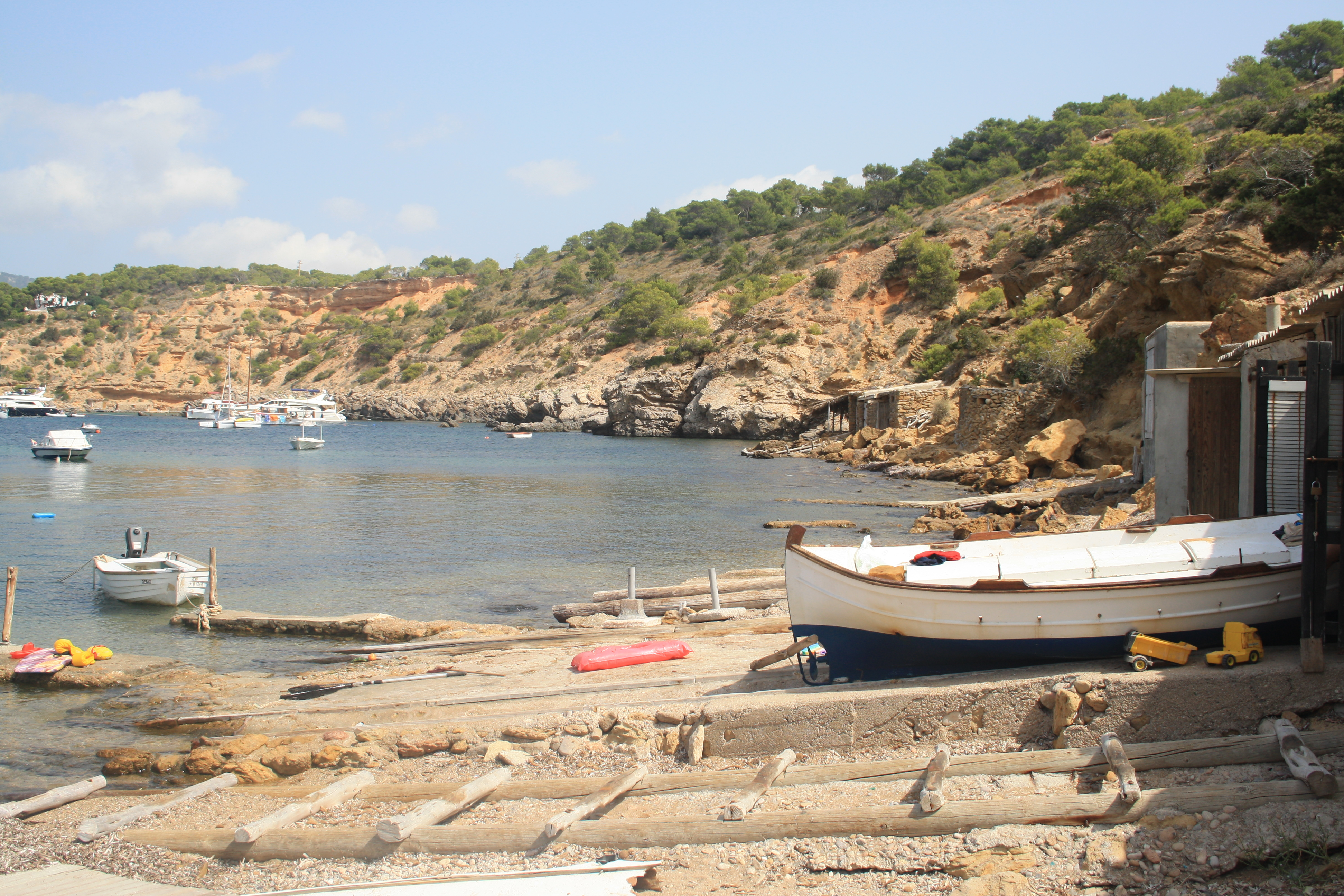 Illot de Porroig, Eivissa